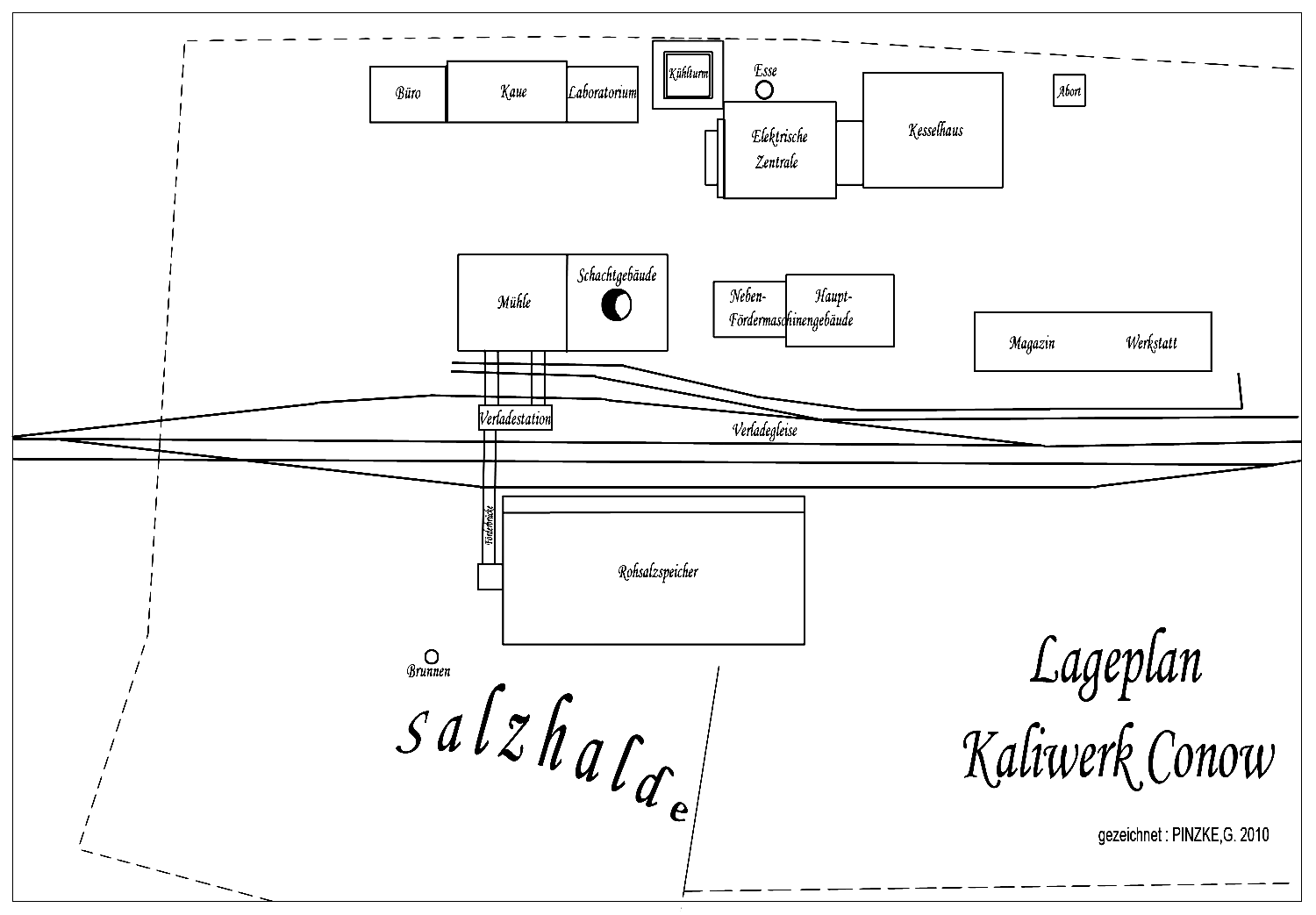 Bebauungplan Schachtareal Kaliwerk Conow.